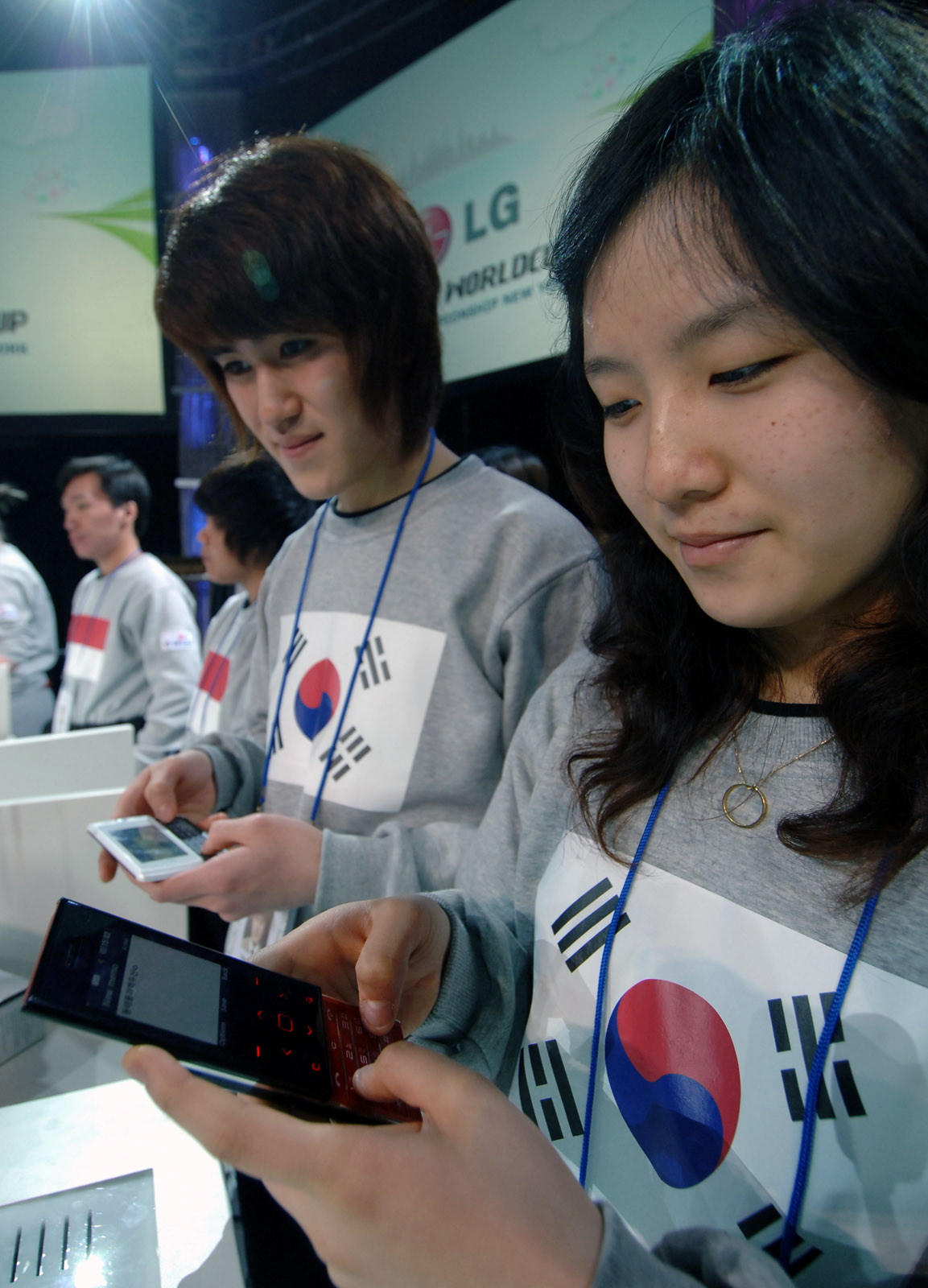 'LG 모바일 월드컵' 결승전(한국팀 경기장면)